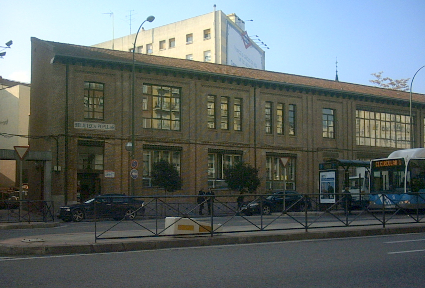 Antigua Biblioteca Popular -- Biblioteca Pública Ruiz Egea